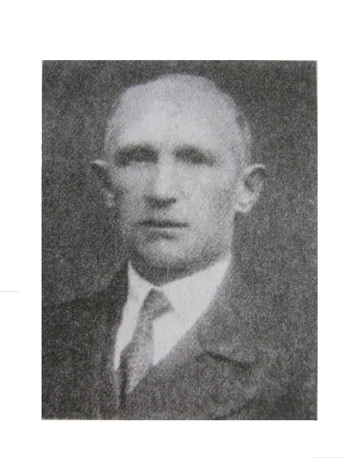 Тершаковець Гриць